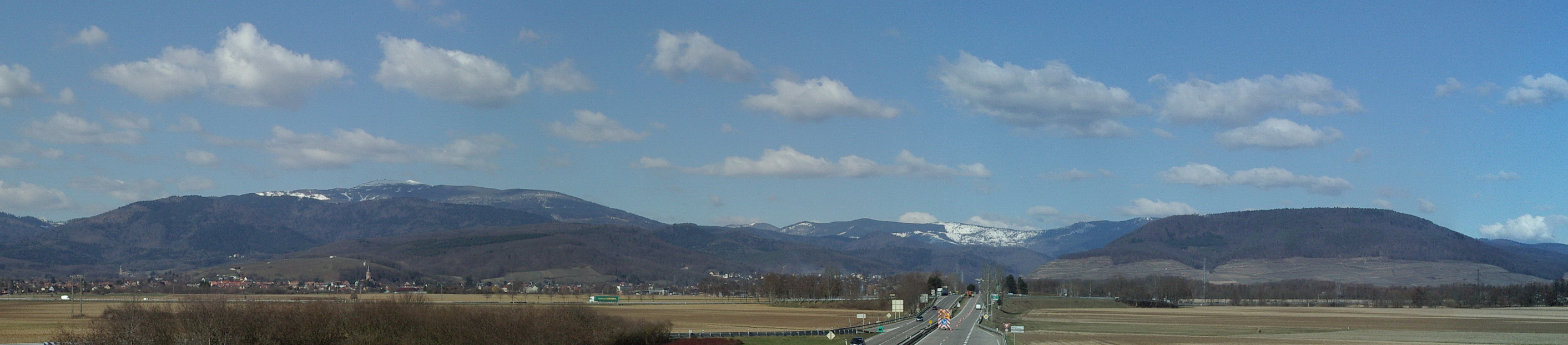 Panorama des Vosges, côté alsacien. A gauche on voit le Grand-Ballon, avec Soultz au pied de celui-ci, et au centre le massif du Markstein.